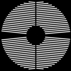 Carey mask